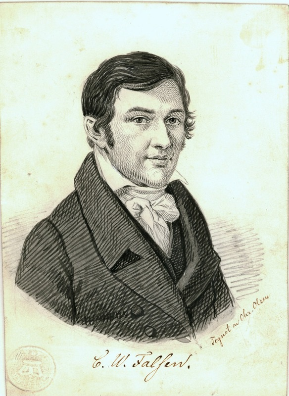 Carl Valentin Falsen